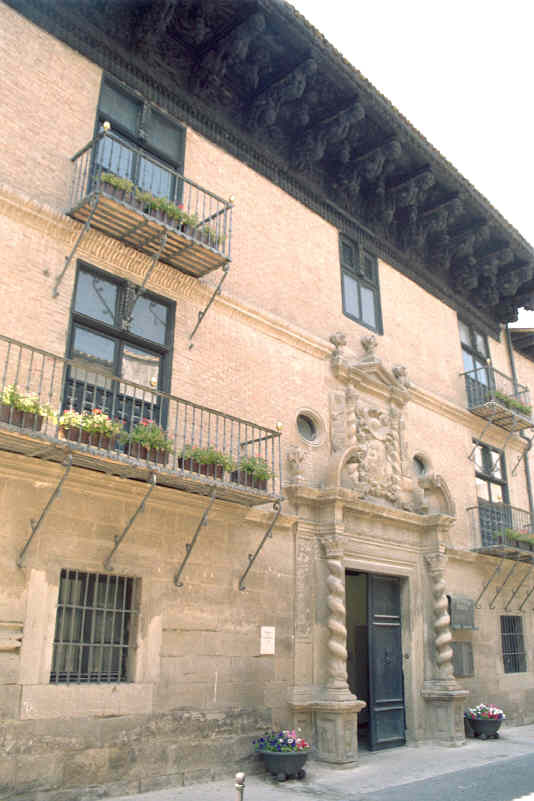 Palacio de Ongay-Vallesantoro en Sangüesa, en la provincia de Navarra, (España). Tomada por JMSE el 9 de Julio de 2003 y cedida a Wikipedia. Categoría: España (imagen) Categoría: Monumentos (imagen)